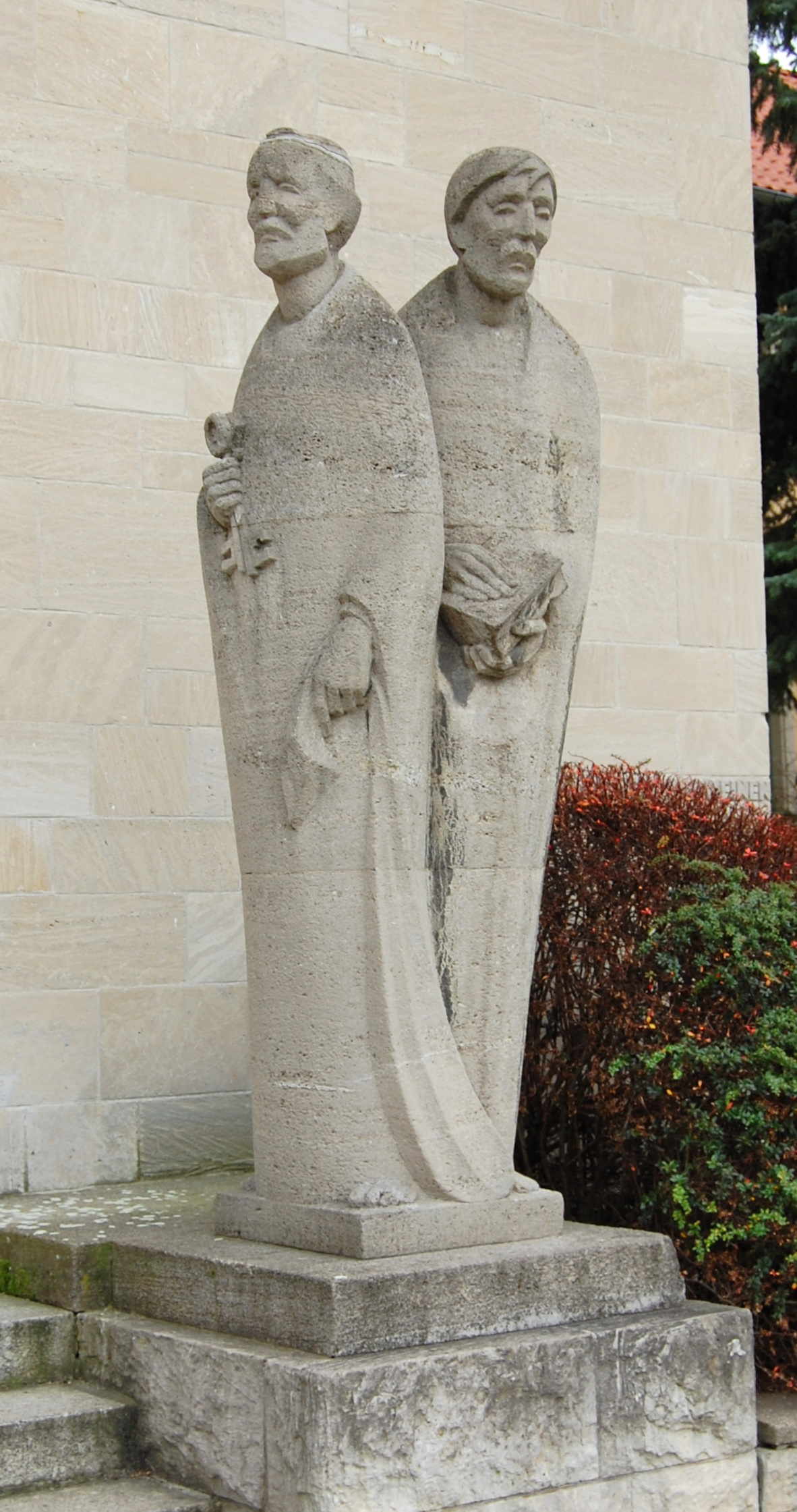 Figuren der Apostel Peter und Paul vor der kathl. Peter-und-Paul-Kirche in Naumburg